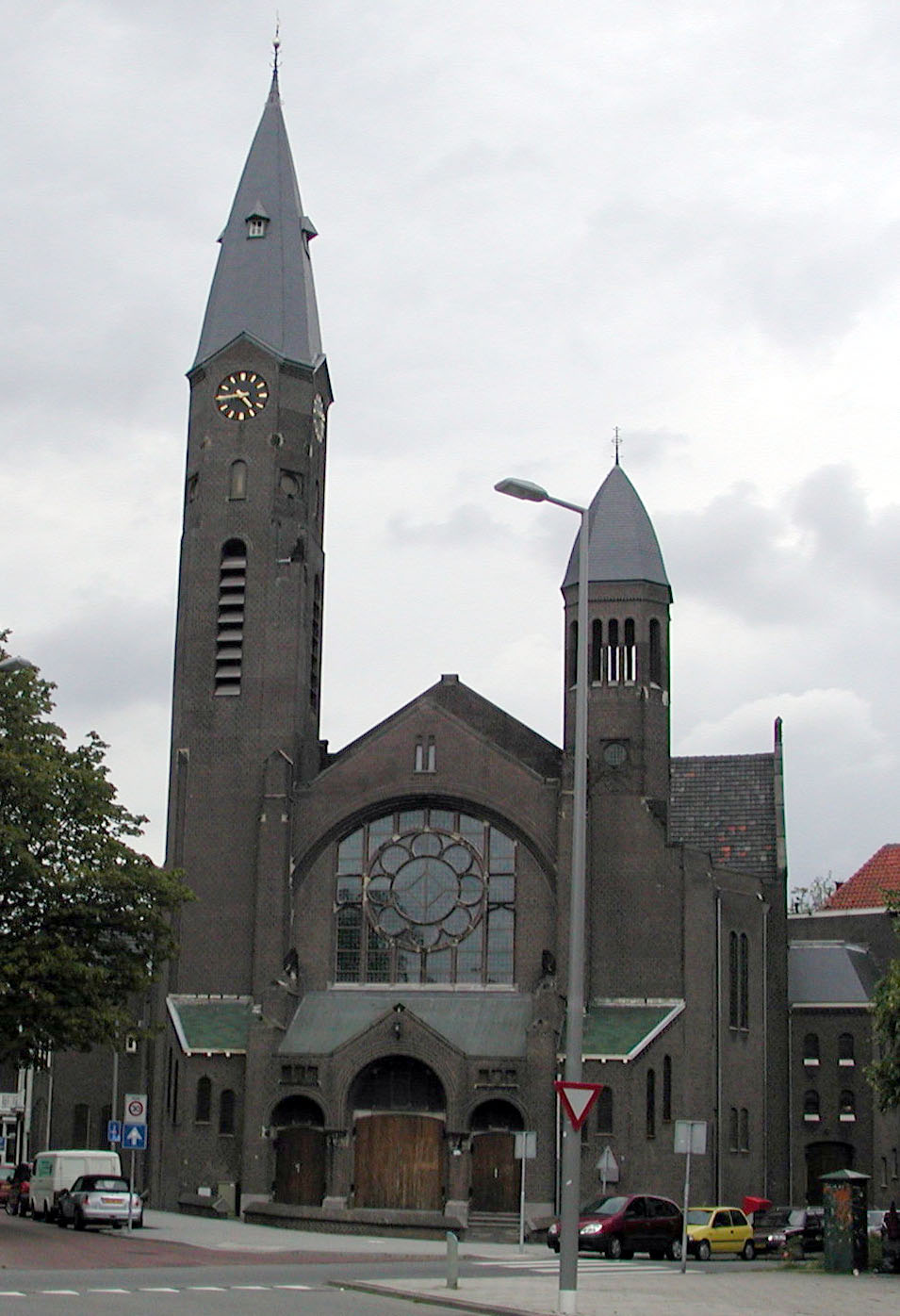 De Bergsingelkerk is een in 1913 door architect Tjeerd Kuipers ontworpen kerk